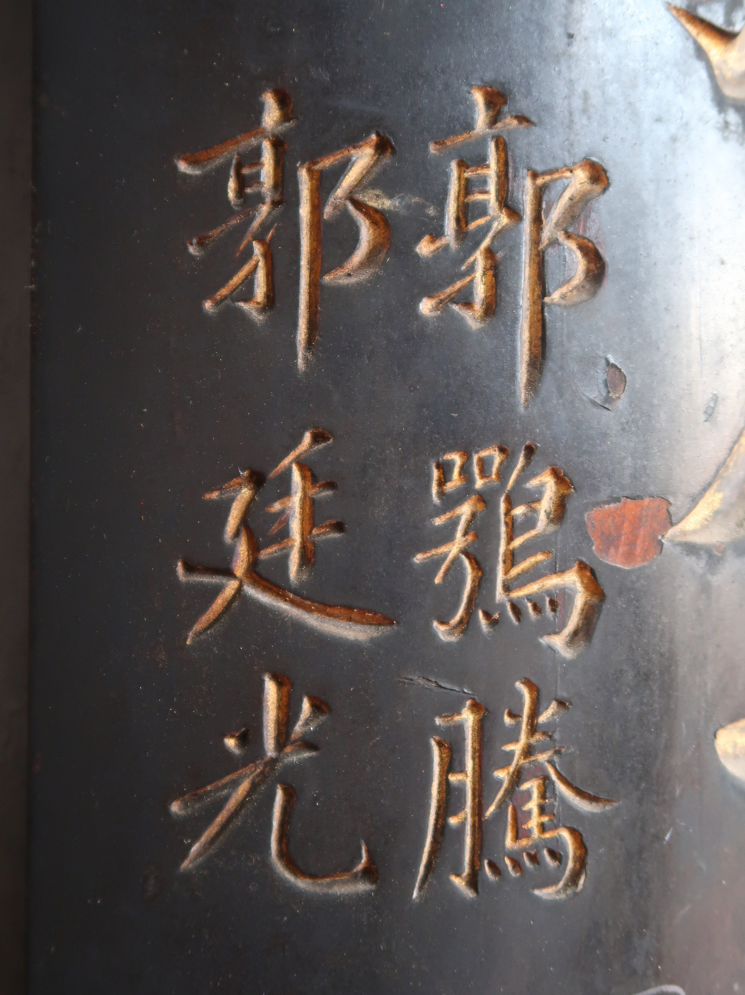 郭鶚騰（郭健秋）與郭廷光落款